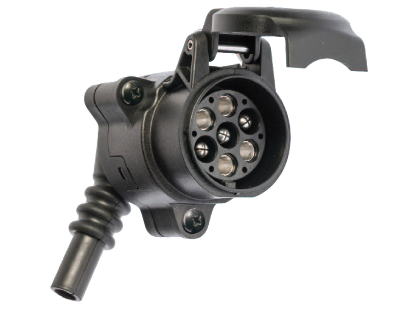 Steckdosenset mit Kontakten, Kontaktträger und EPDM-Dichtung 90°